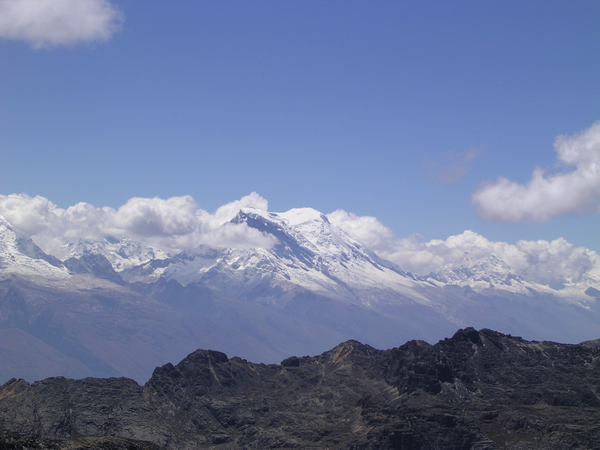 Tomada desde la segunda cima más elevada de la Cordillera Negra, Carhuapunta o Flerypunta 5170 m, en 2006. Desde este mirador se avista la Cordillera Blanca en toda su extensión, pero sus principales cimas están prácticamente al frente del observador. De mayo a septiembre hay las mayores probabilidades de encontrar cielo despejado.